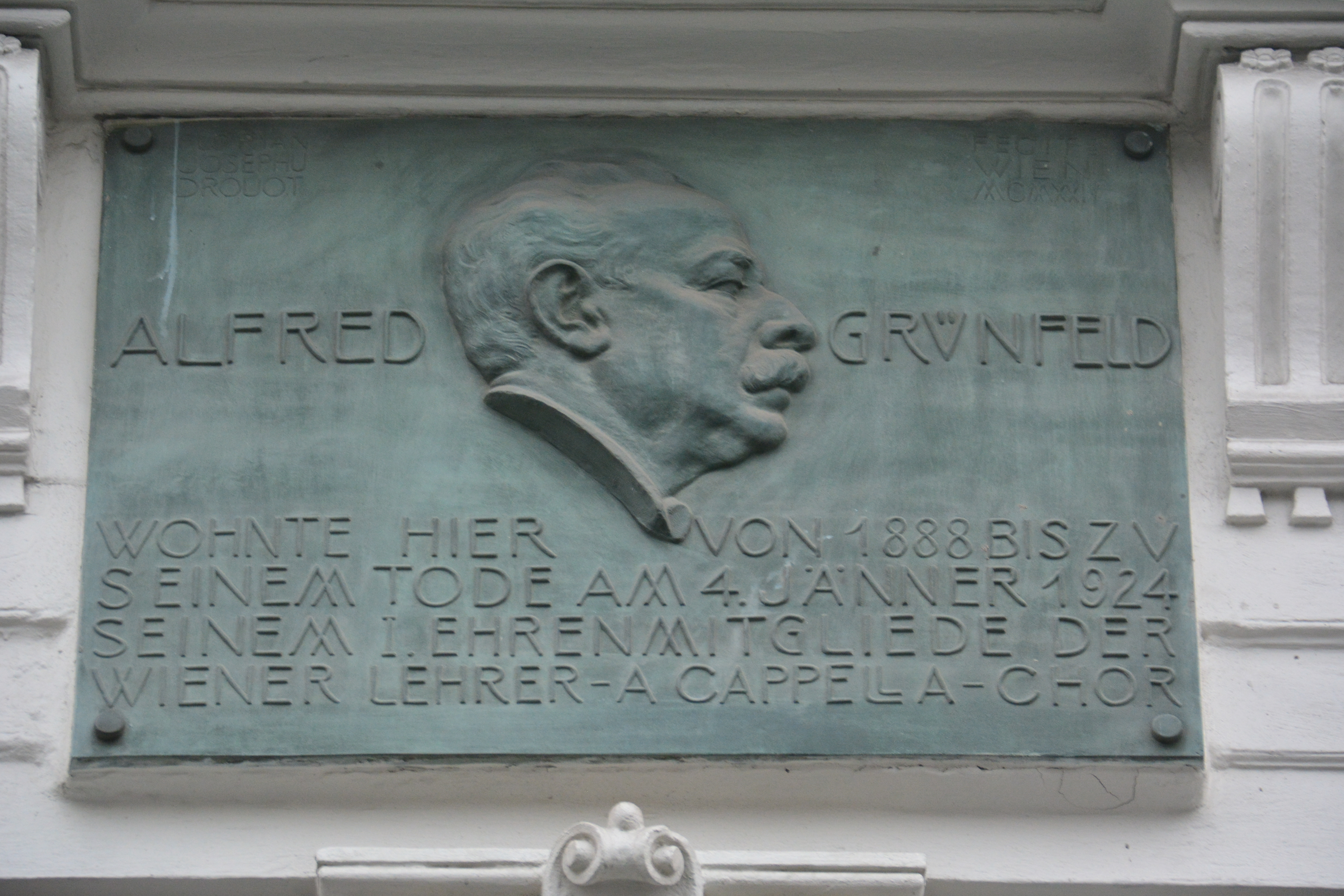 Gedenktafel für Alfred Grünfeld (Wien, Getreidemarkt 10)